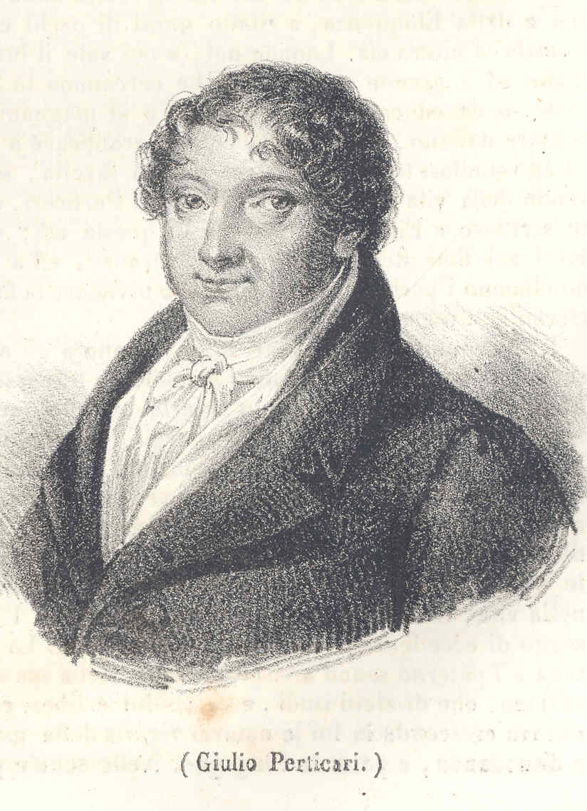 Autore sconosciuto, da Poliorama Pittoresco 1837-38, ritratto di Giulio Perticari, autore, opera il cui autore è morto da più di 70 anni, acquisita da scanner